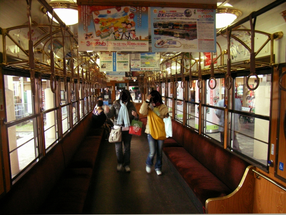 嵐山駅停車中のja:京福電気鉄道モボ21形の車内。